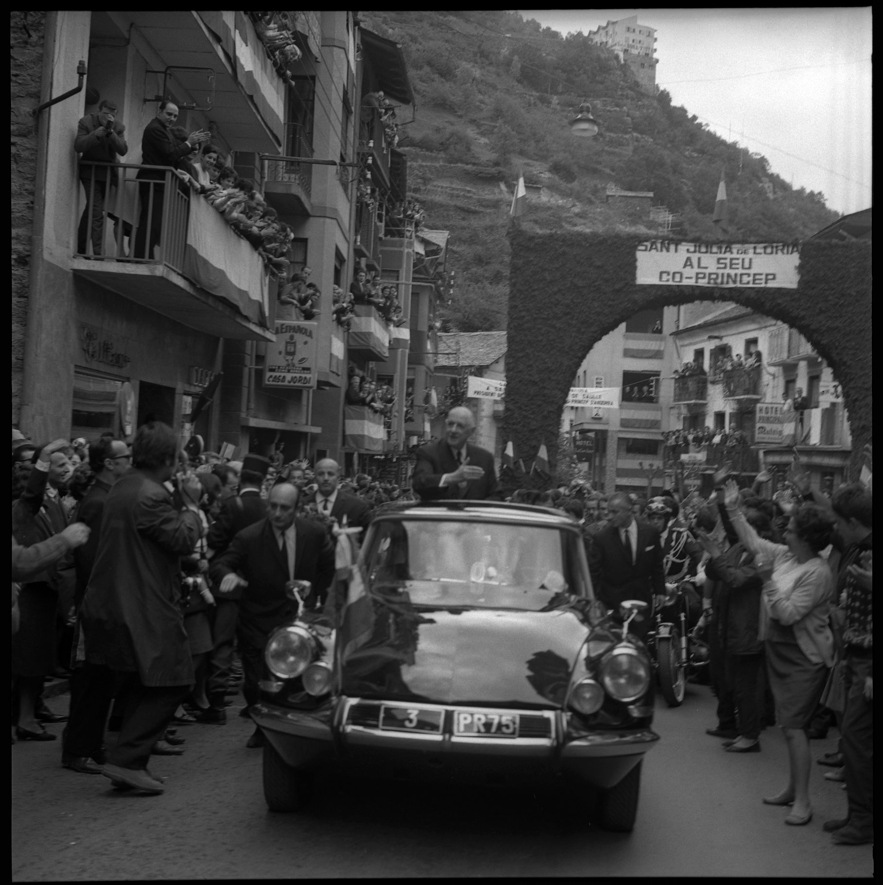 Sant Julia de Loria (Andorre). 23-24 Octobre 1967. Vue du Général De Gaulle dans les rues de Sant Julia de Loria en Andorre.